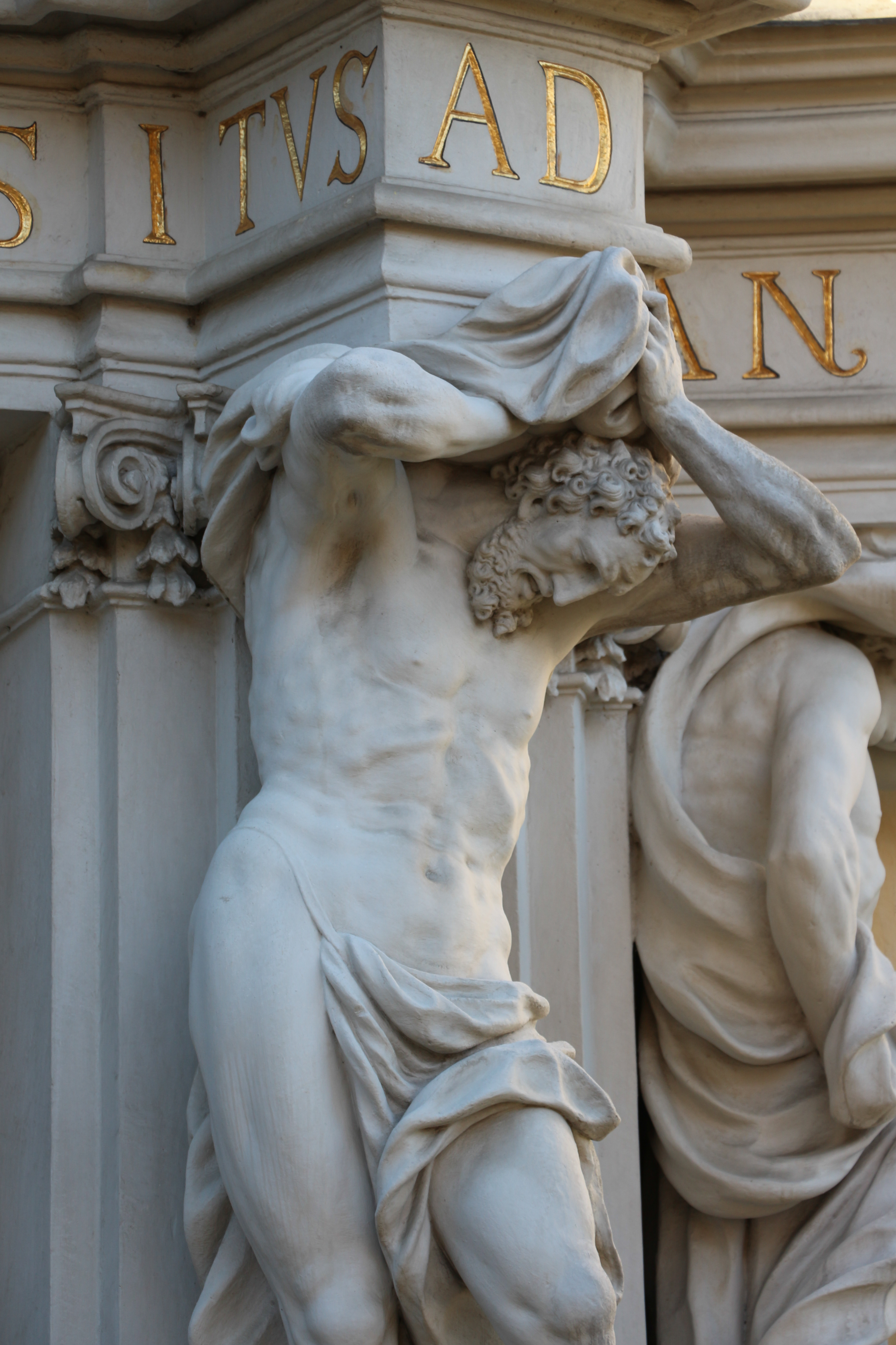 Gesamtanlage Augustinerchorherrenkloster